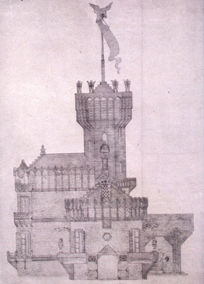 Proyecto de pabellón de caza para las Bodegas Güell, Sitges (Barcelona).